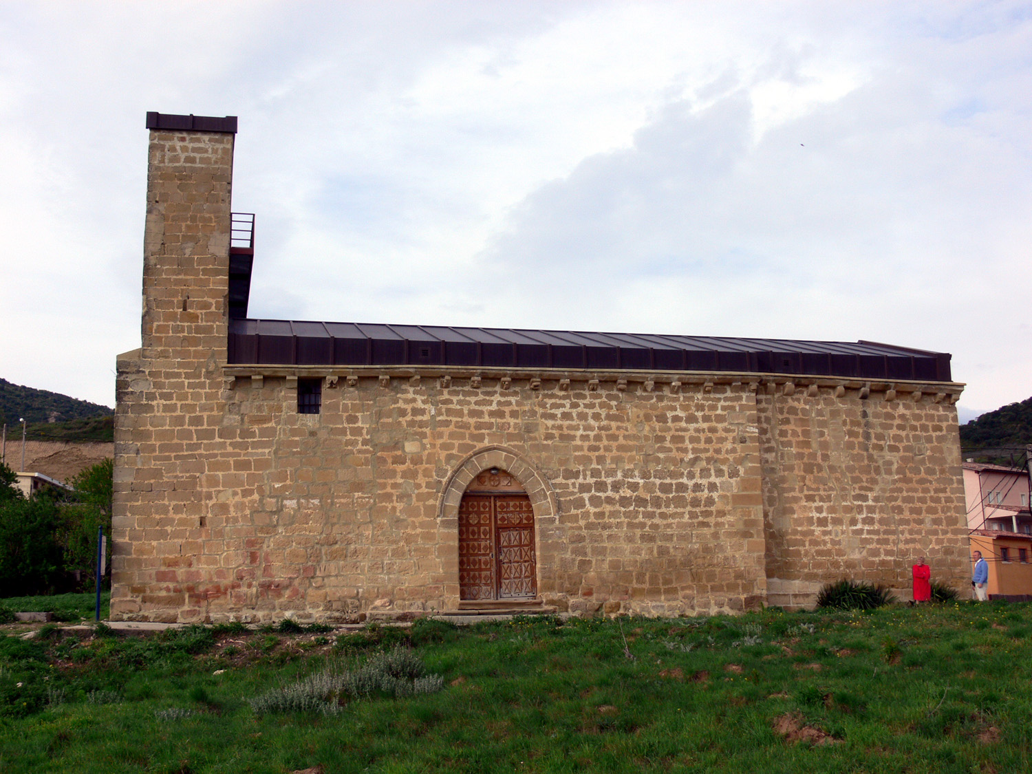 Iglesia de San Esteban en Galbárruli, La Rioja - España.